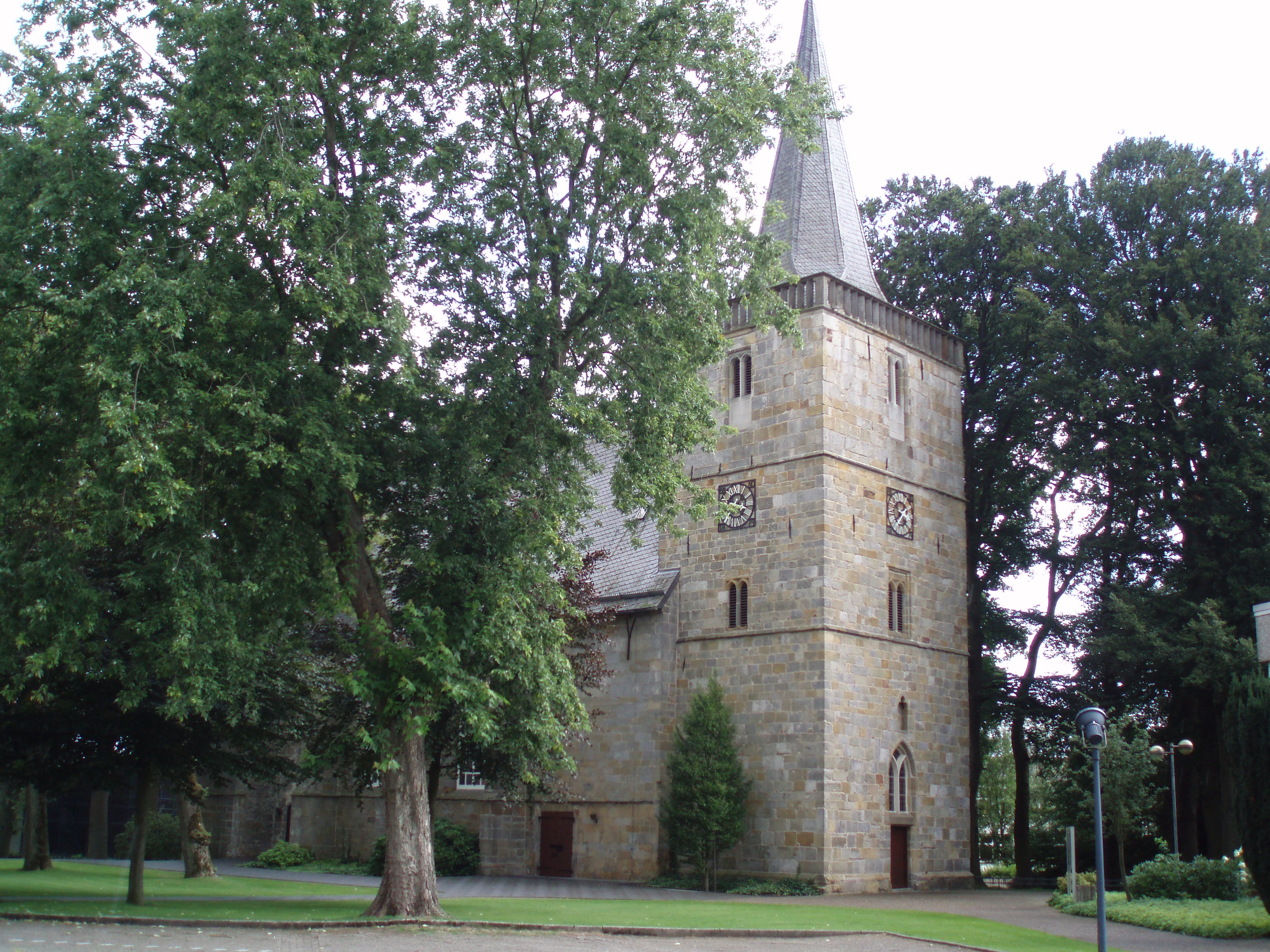 Gereformeerde kerk uit 1150 in Emlichheim.